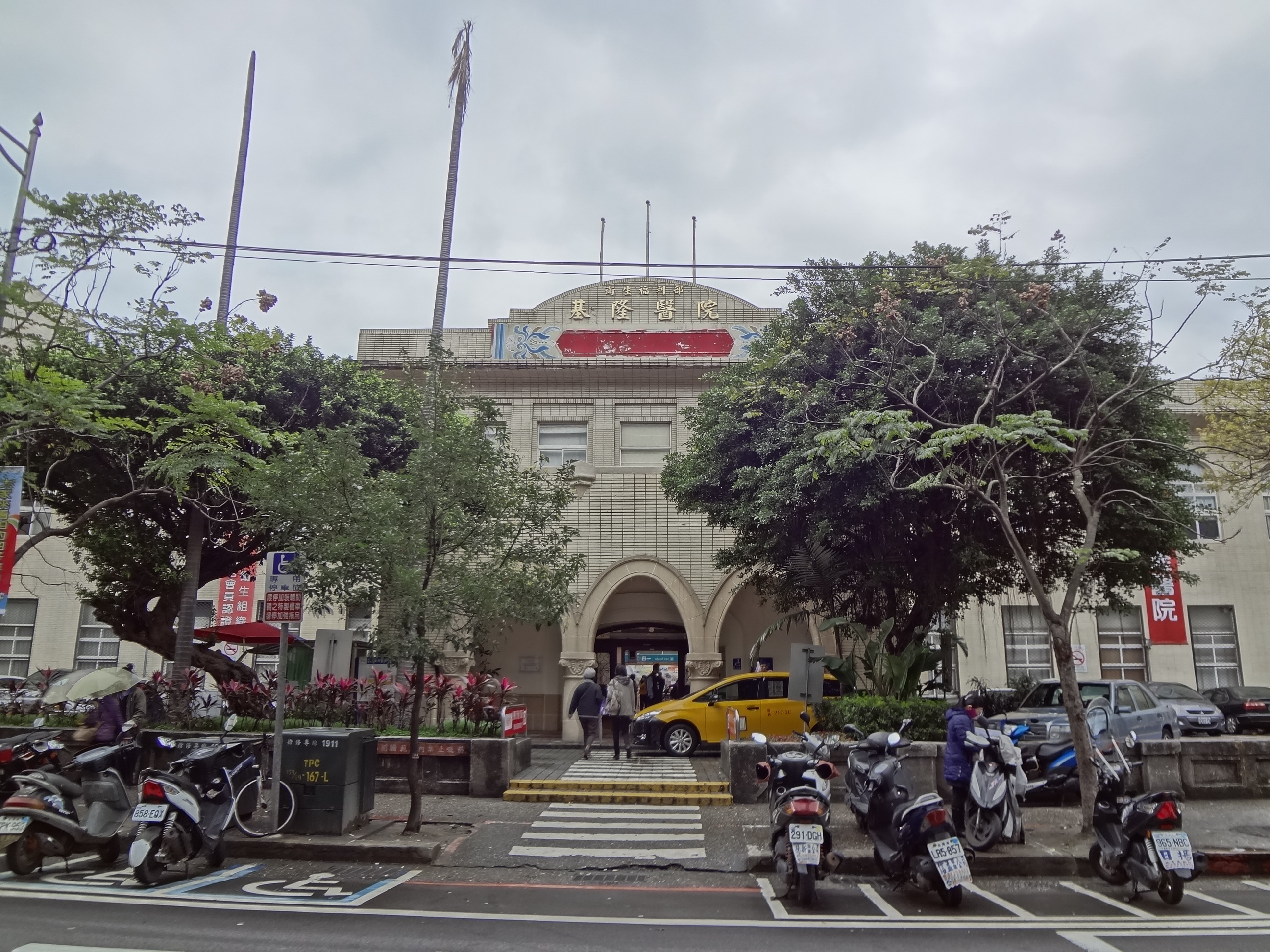 中華民國衛生福利部基隆醫院大門。